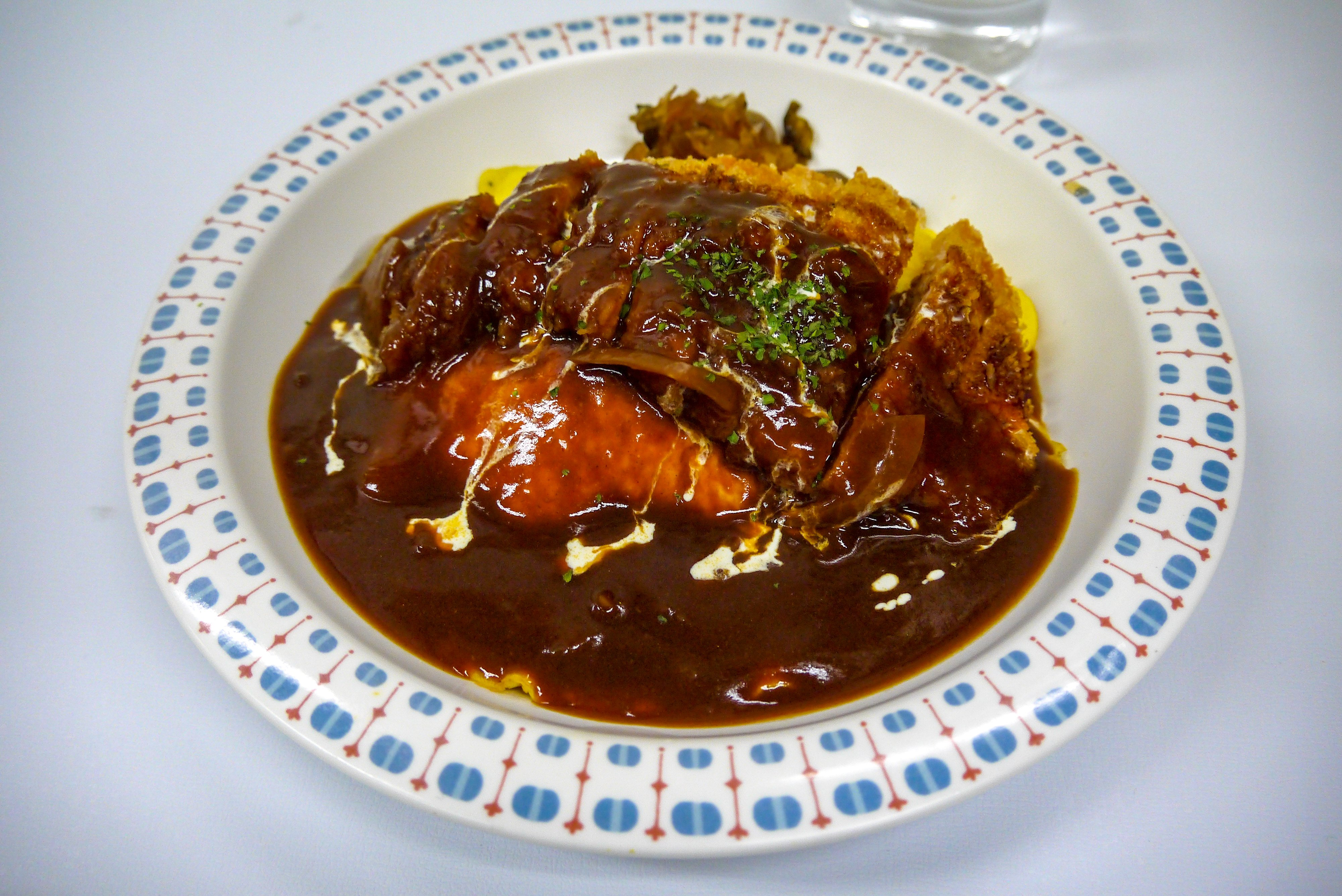 福井県越前市、大江戸、ボルガライス、京王百貨店新宿店購入、洋食